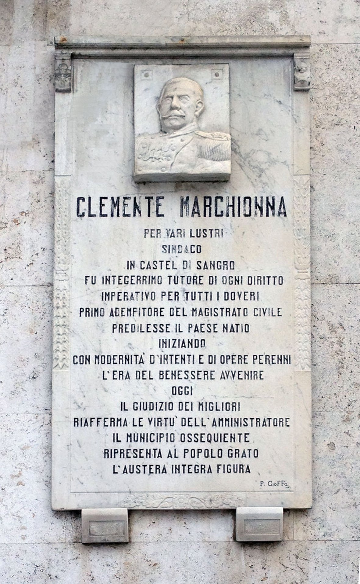 Targa in memoria del Sindaco Clemente Marchionna